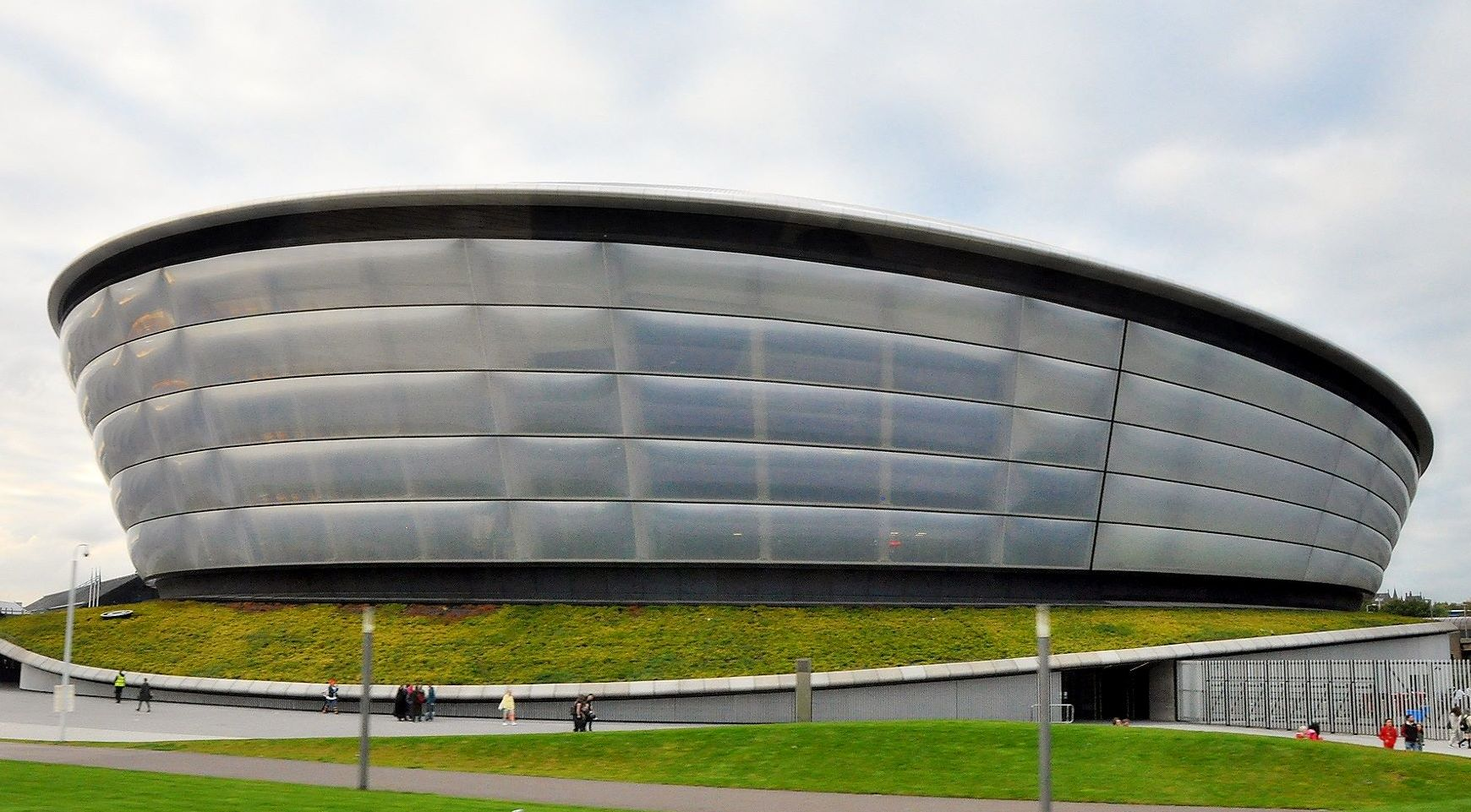 Glasgow, Sunset River Clyde bei Beardmore Hotel